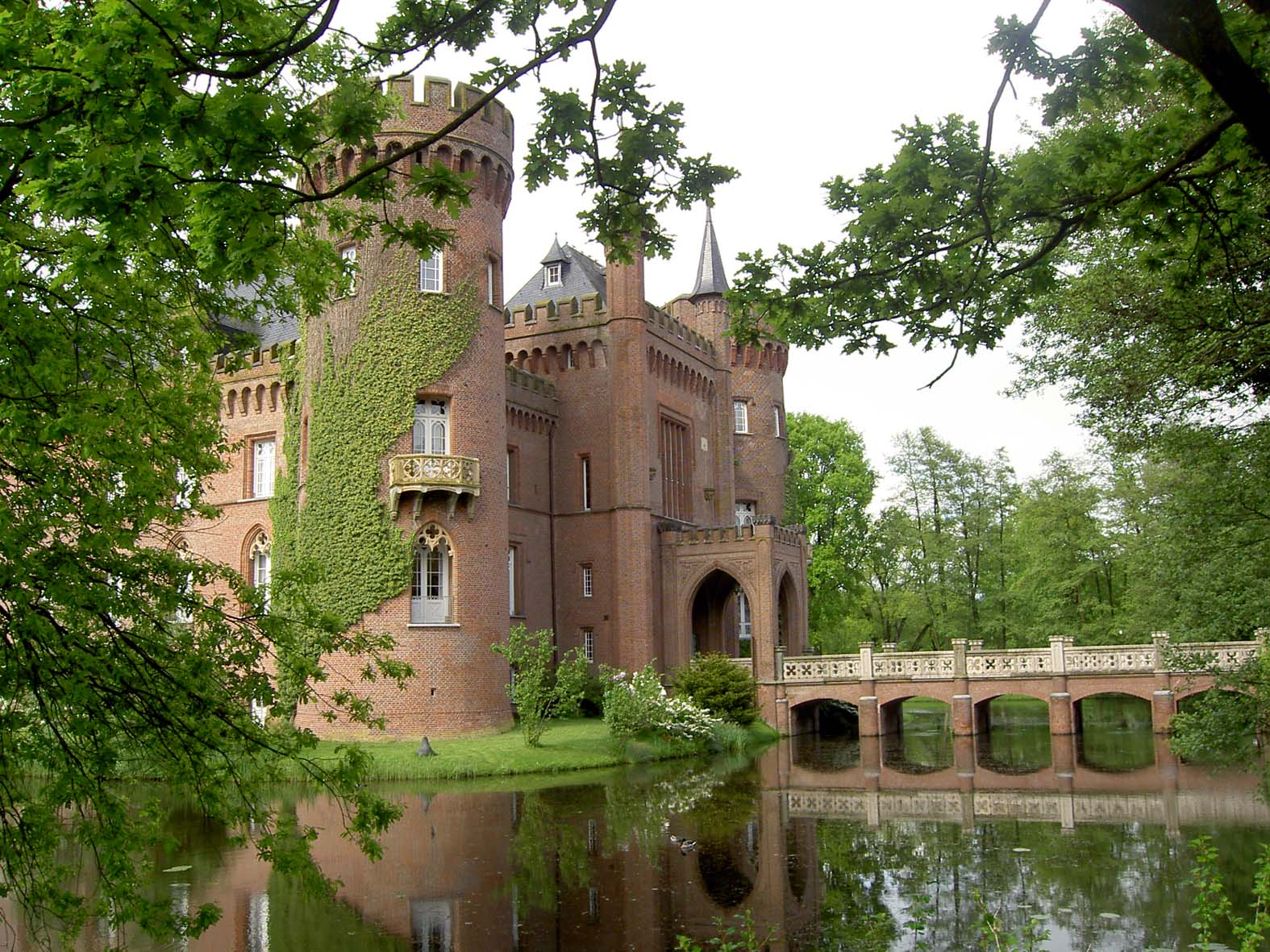 Brücke über den Wassergraben des Schlosses Moyland